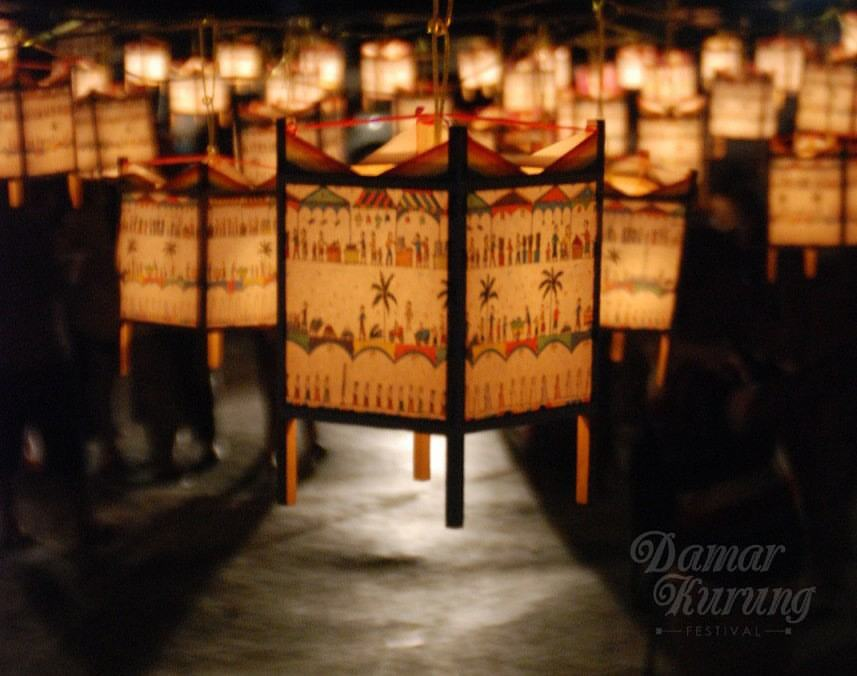 Festival Anak Gresik 1001 DamarKurung